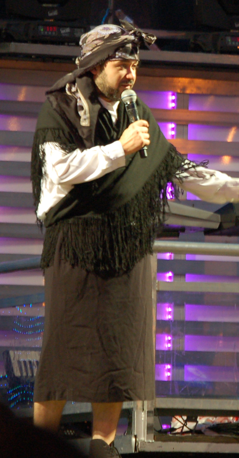 Marcos Pereiro no espectáculo de Mucha e Nucha, as Cantareiras de Ardebullo, nas festas do Carme de Marín